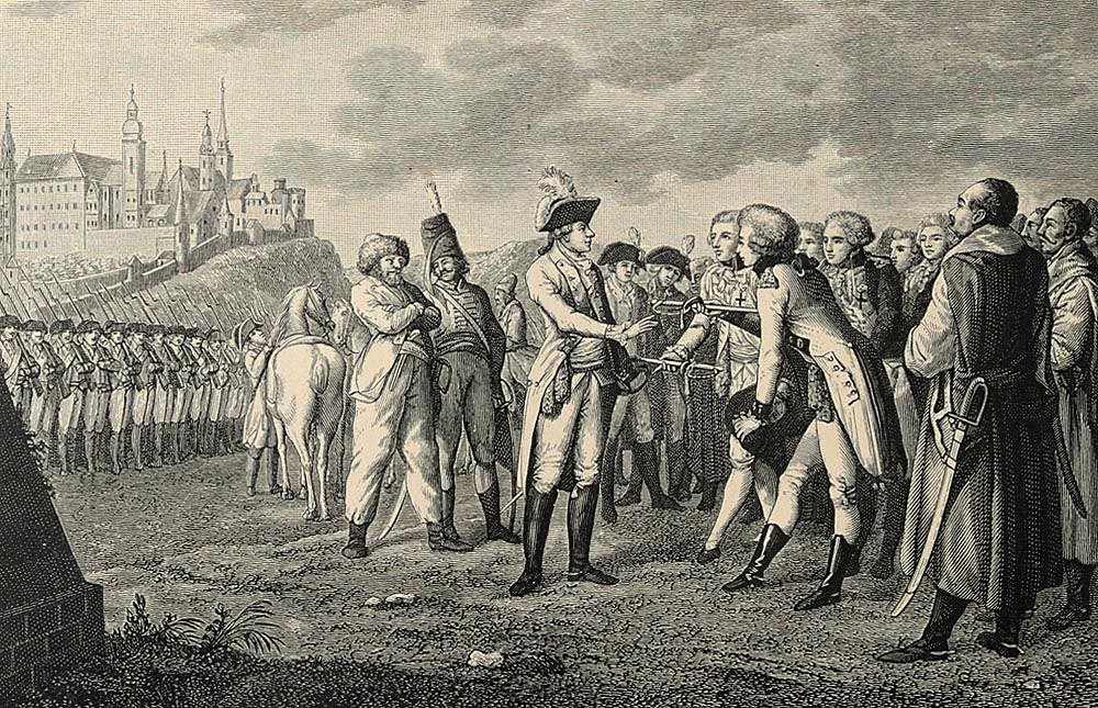 Сдача Краковского замка. Французские офицеры отдают А.В. Суворову шпаги